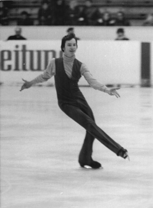 Jan Hoffmann ADN-ZB Häßler -19.11.72 Dresden: DDR-Eiskunstläufer überzeugten beim Saisonstart. Jan Hoffmann (SC Karl-Marx-Stadt) wurde beim traditionellen Eiskunstlaufwettbewerb um die Pokale der blauen Schwerter souveräner Sieger. Der Vorjahressieger verwies seinen Mannschaftskameraden Bernd Wunderlich (SC Dynamo Berlin) auf Platz zwei. Den dritten und vierten Platz bei den Herren belegten mit Kokora und Lisowski sowjetische Sportler. (vergl. L1119-13N)